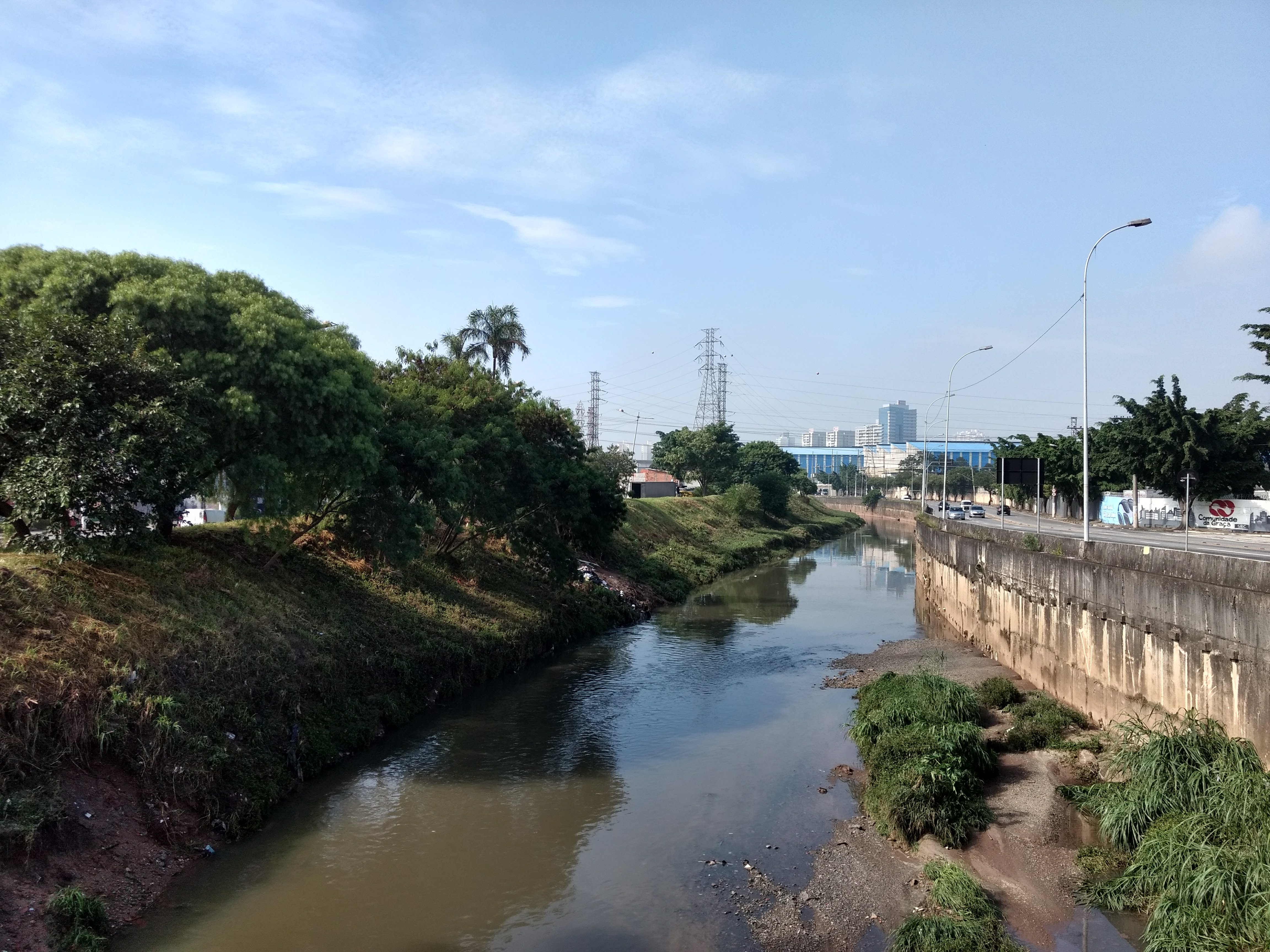 Riberirão dos Meninos em São Bernardo do Campo - São Paulo - Brasil